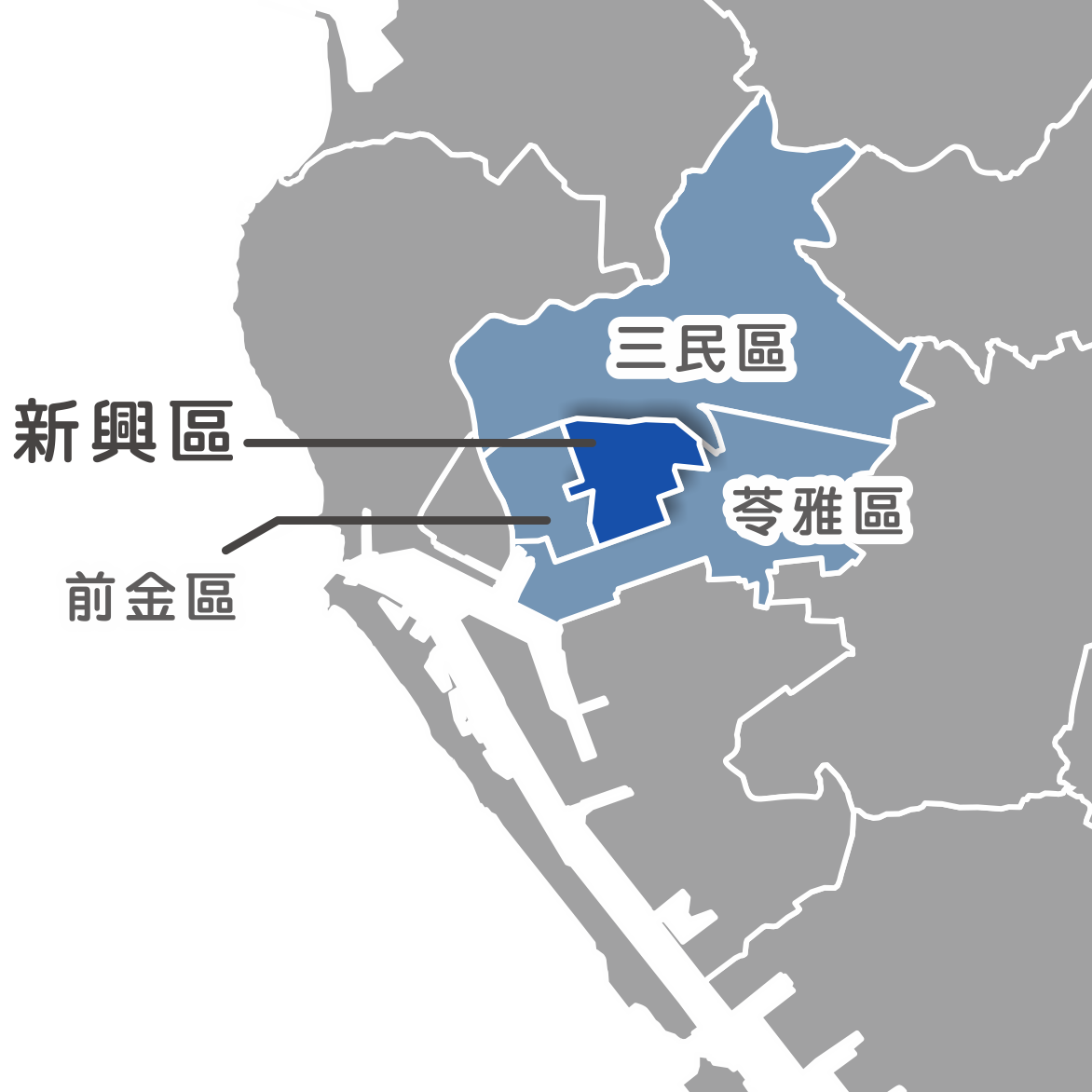 新興區相對位置